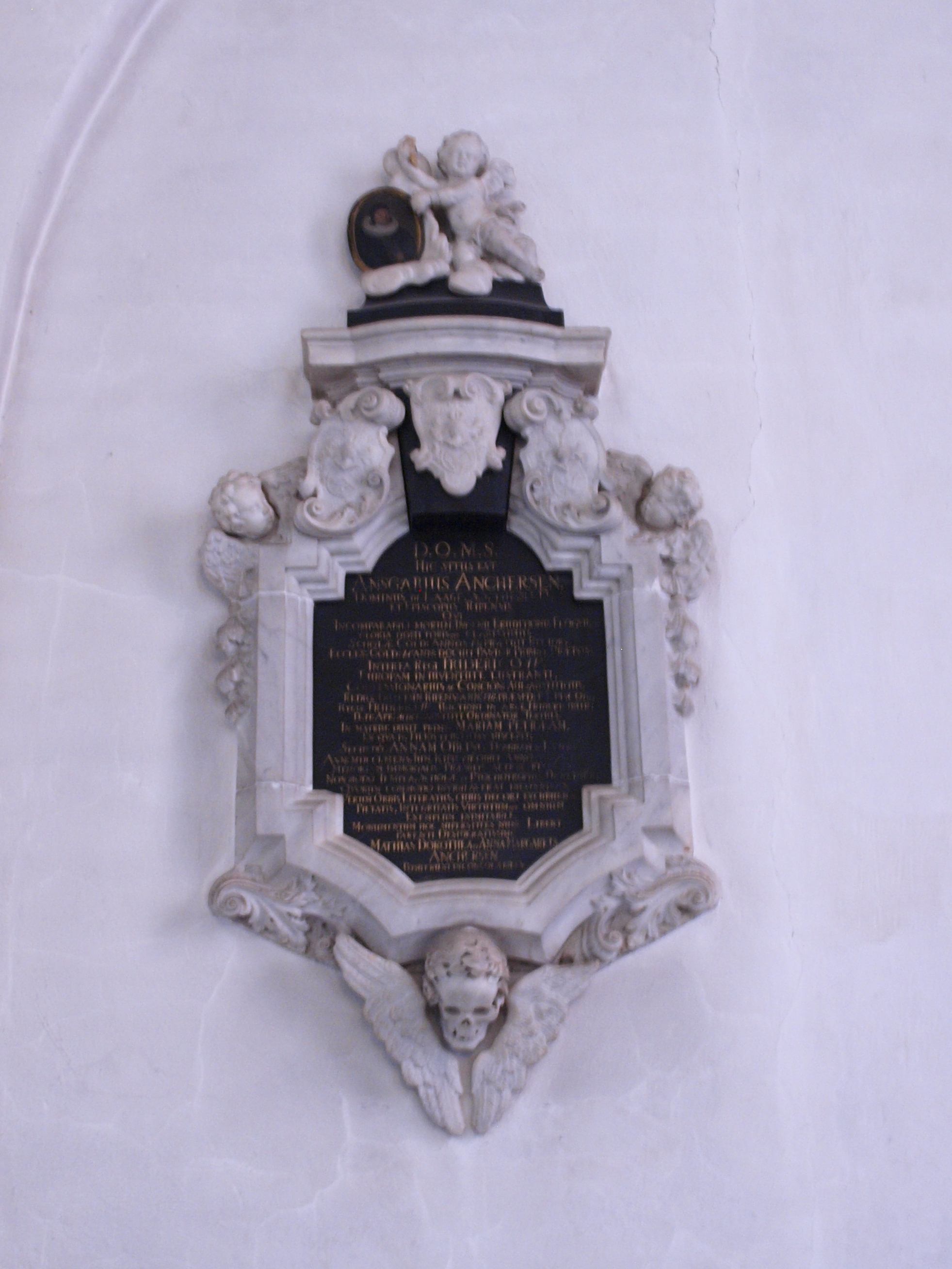 Epitafium over Ancher Anchersen. Er ophængt i Sankt Nicolai Kirke (Kolding) søndre korsarm.